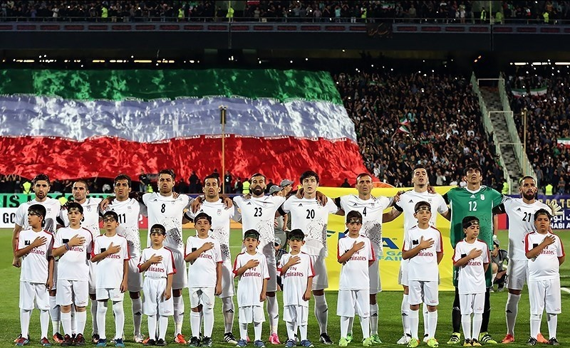 Iran national football team - October 2012.jpg (against South Korea)